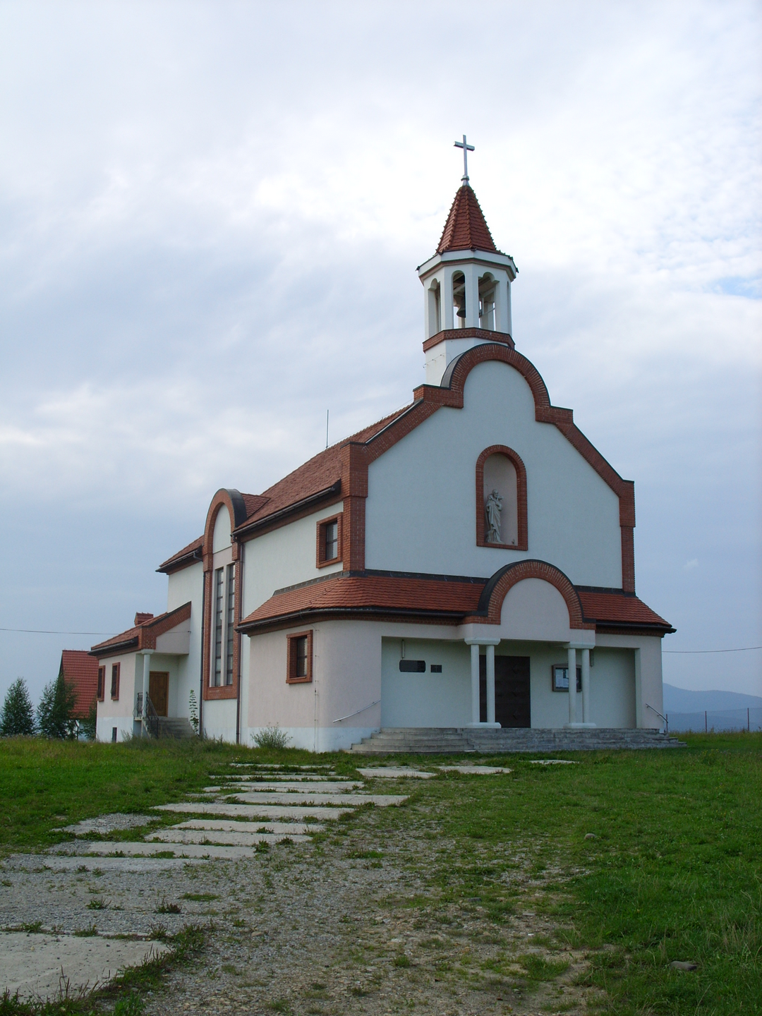 kościół w Żywcu w dzielnicy Kocurów-Koleby